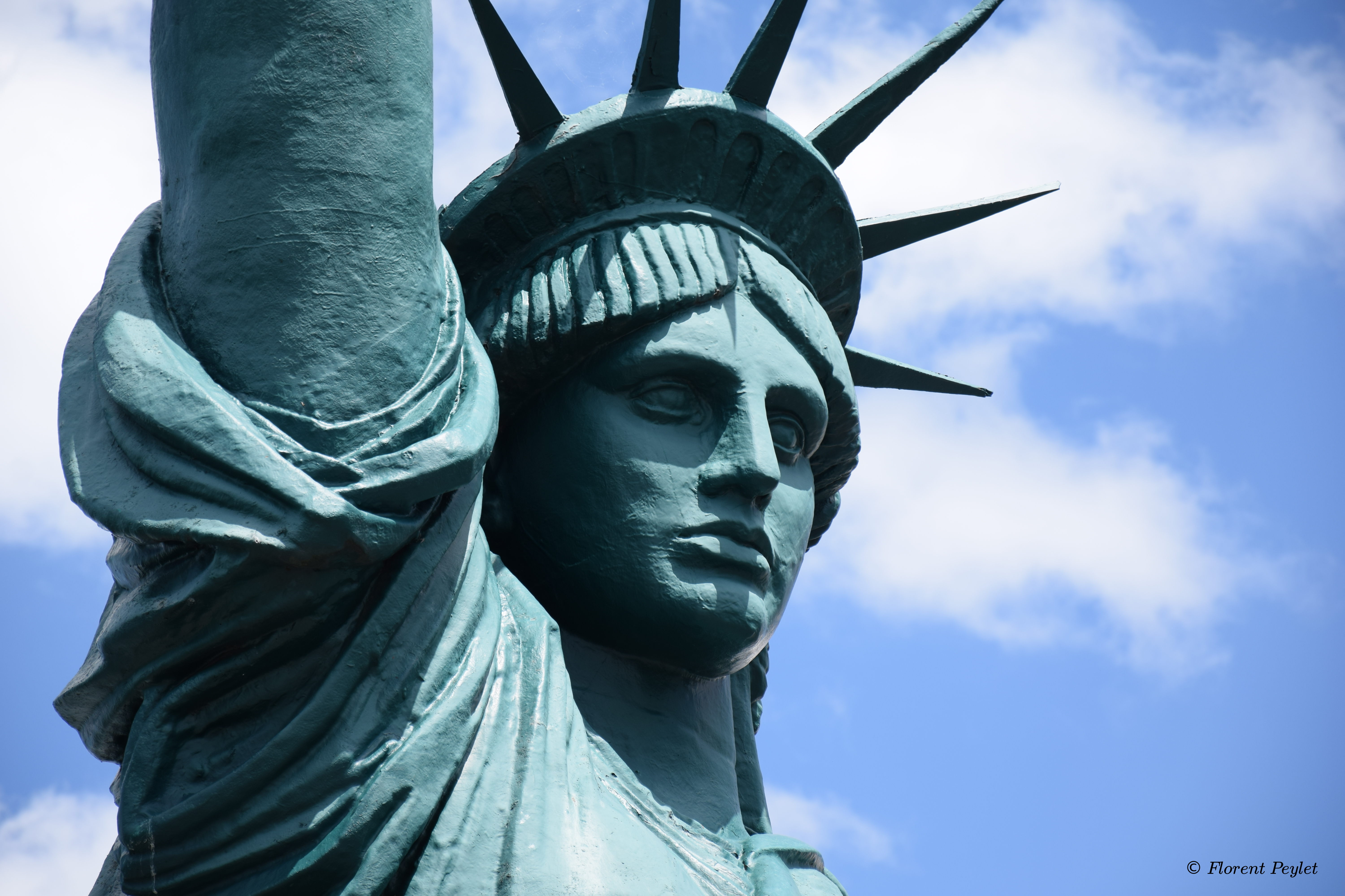 Lors de son passage à l'Armada de Rouen